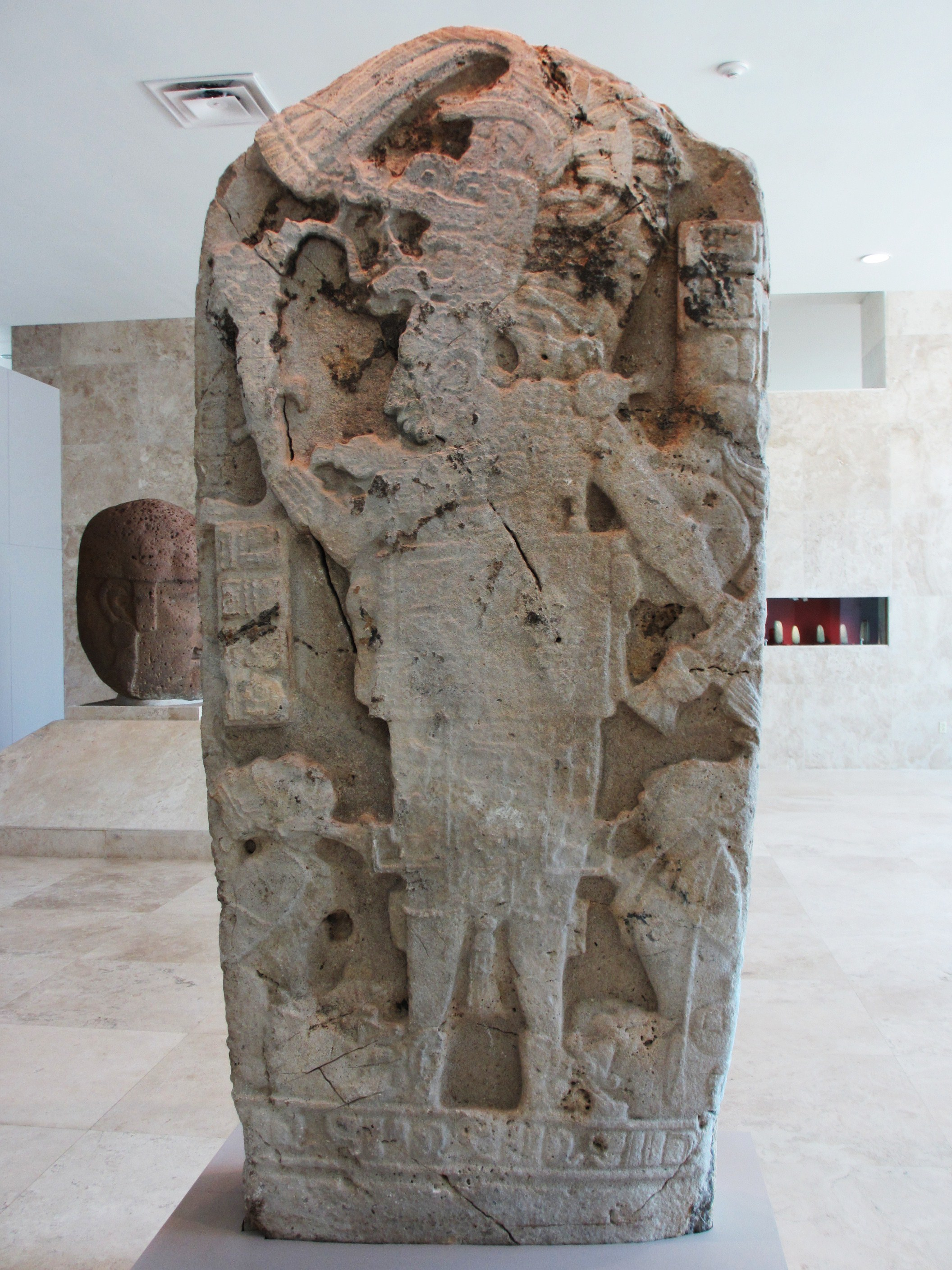 Cara principal de la Estela 1 de Moral Reforma que representa " Wo Chan Kawil" señor de Moral Reforma quien tiene a dos esclavos en posición de sumisión. Museo Regional de Antropología "Carlos Pellicer Cámara". Villahermosa. Tabasco. México